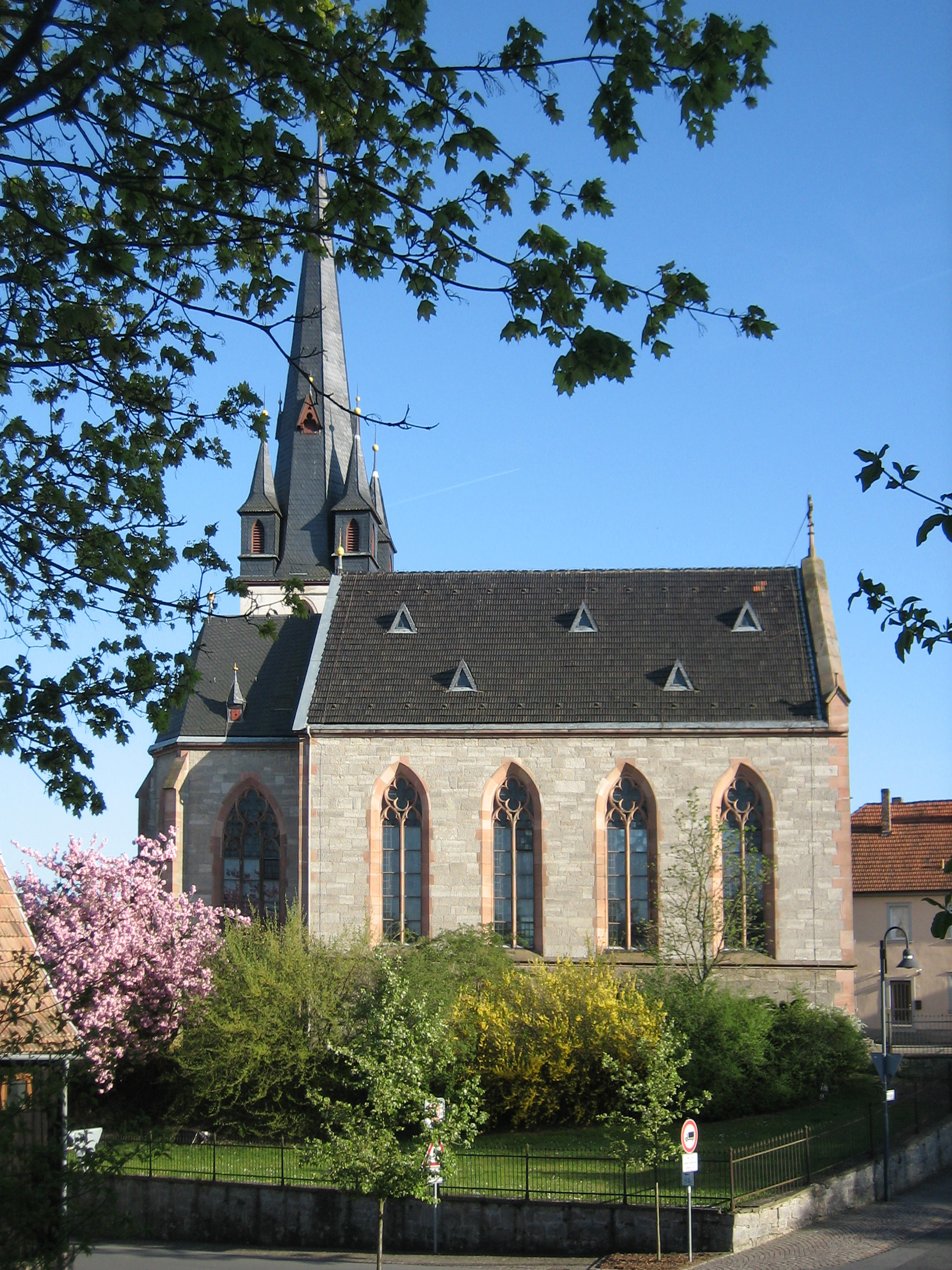 St. Katharina Kirche in Niederlauer, Landkreis Rhön-Grabfeld, Unterfranken, Bayern, Deutschland